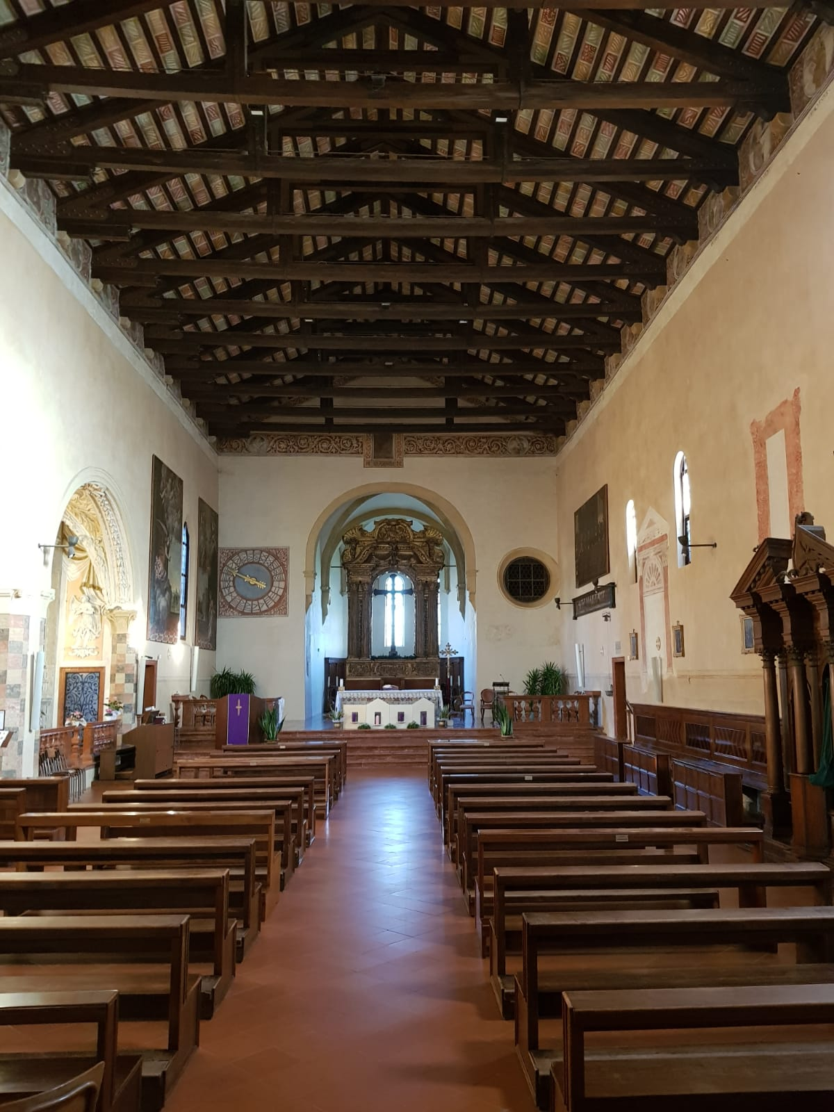 interno del santuario della madonna delle grazie